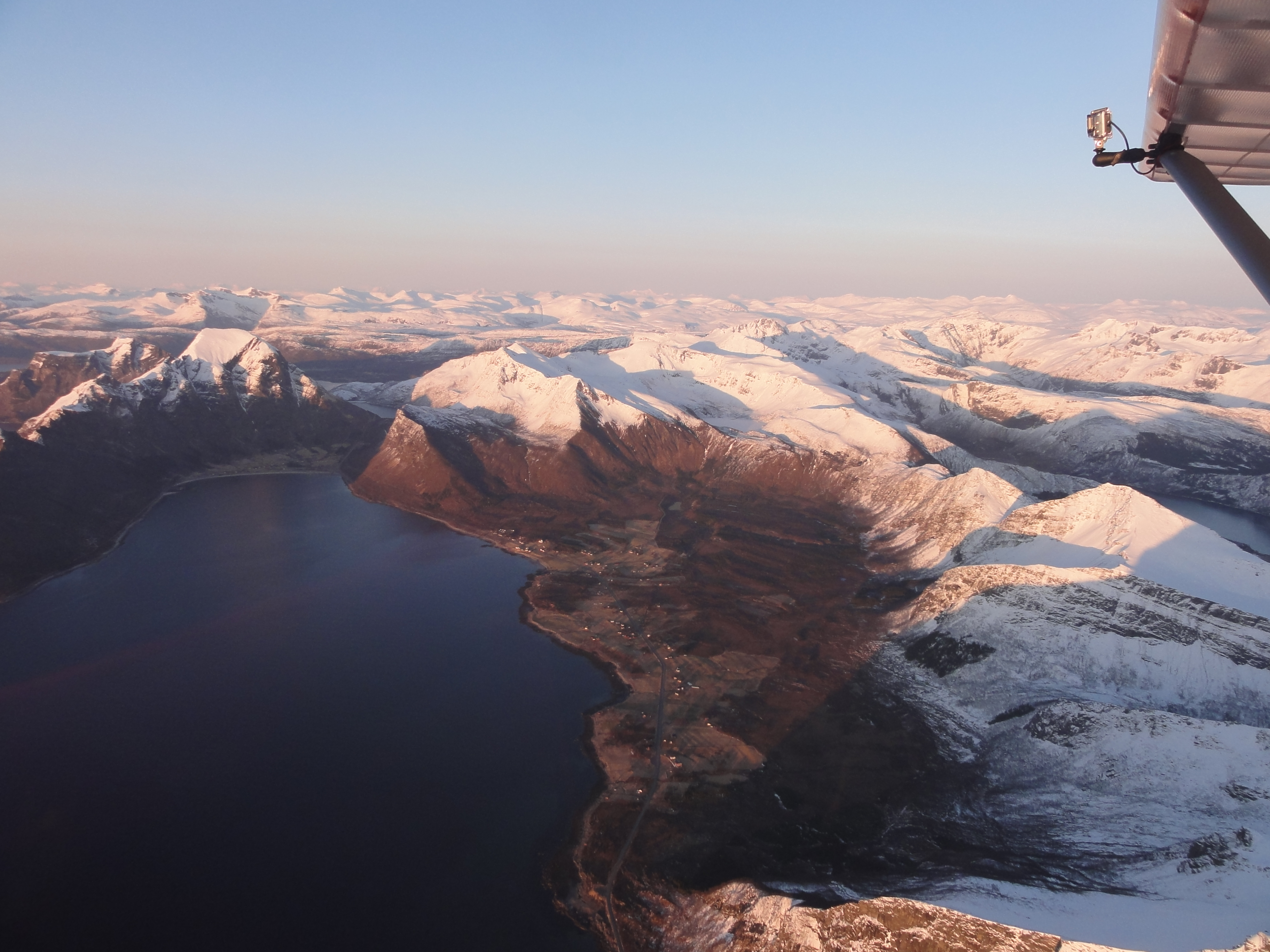 Bygda Storvik i Gildeskål kommune i Nordland til venstre for sentrum av bildet. Den markerte toppen over bygda heter Høgnakken. Bebbygelsen langs fjorden til høyre på bildet heter Grimstad og noe lenger inn Mevik.